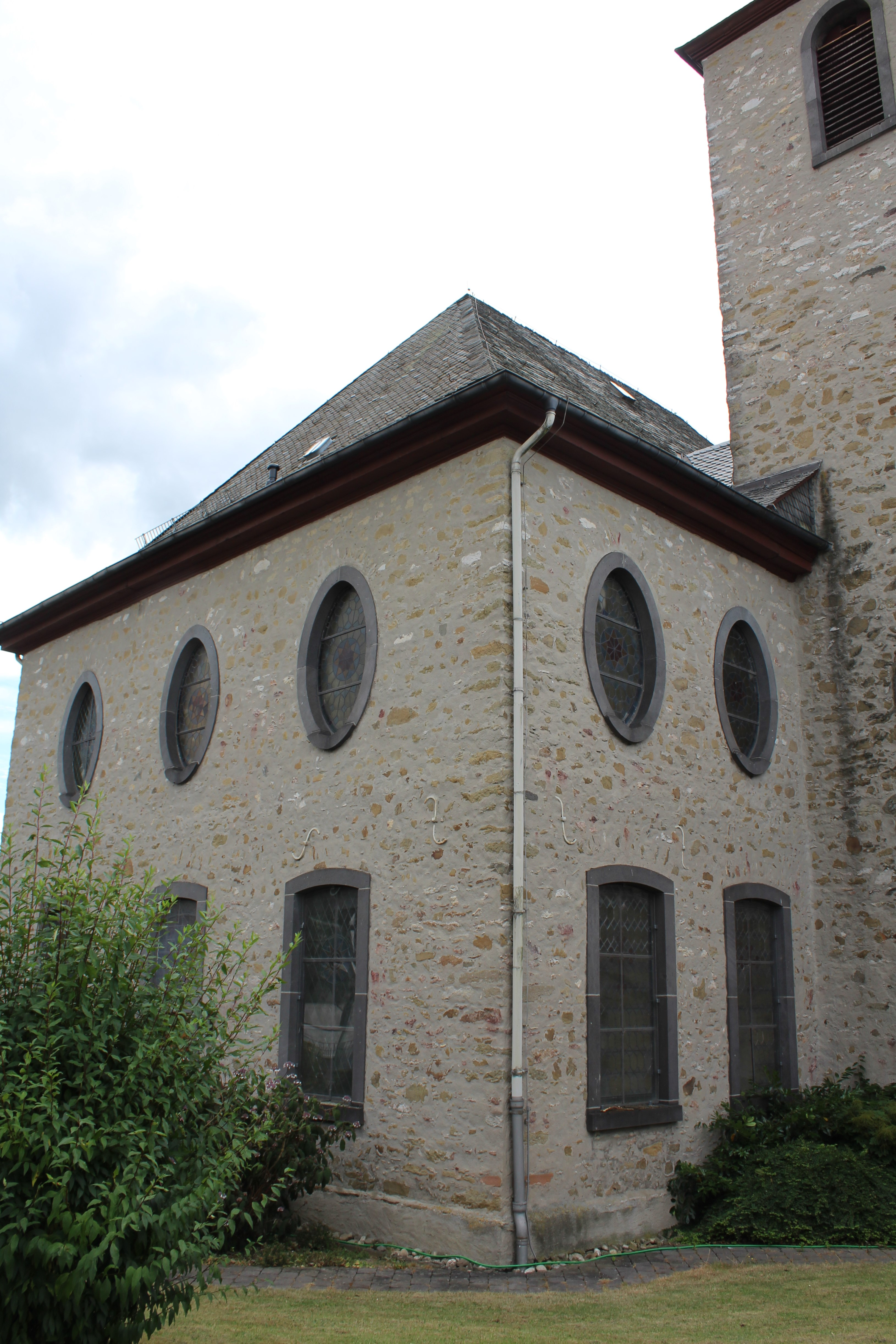 Ev. Kirche Schwalbach, Schöffengrund, Lahn-Dill-Kreis, Hessen, Deutschland